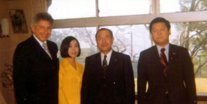 Stanford R. Ovshinsky and Momoko Itō met Kakuei Tanaka and Ichirō Ozawa.